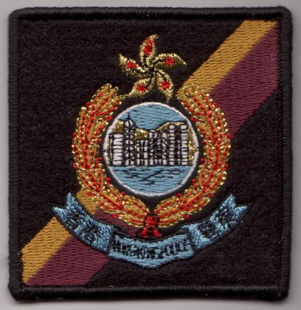 Hongkong police patch